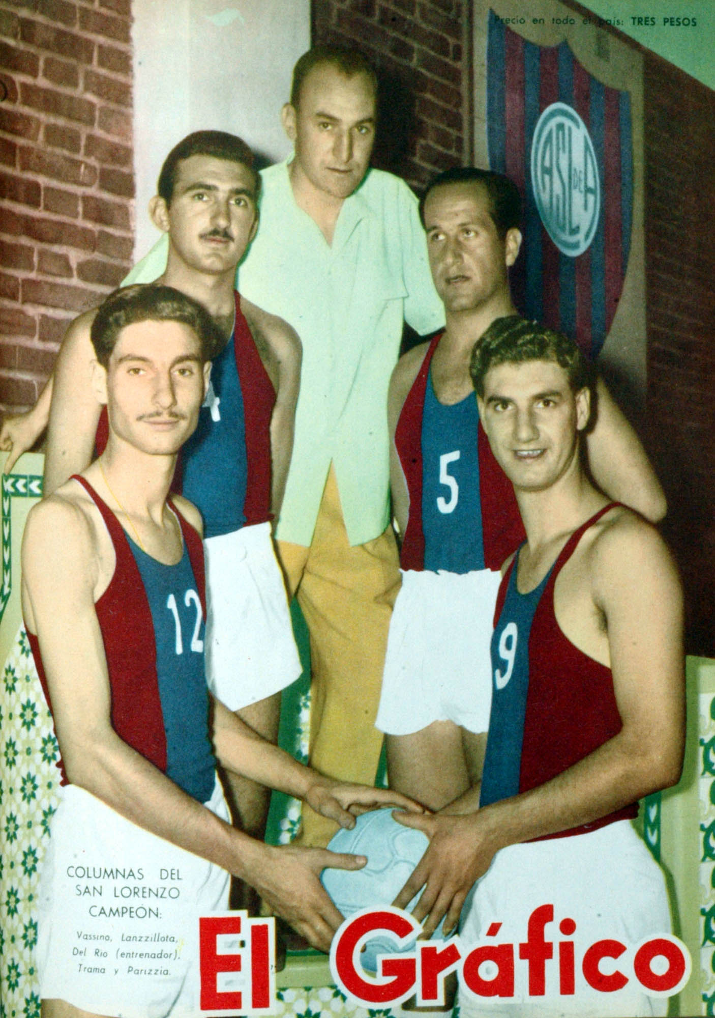 El Grafico del 22 de Febrero de 1957. Edicion 1954